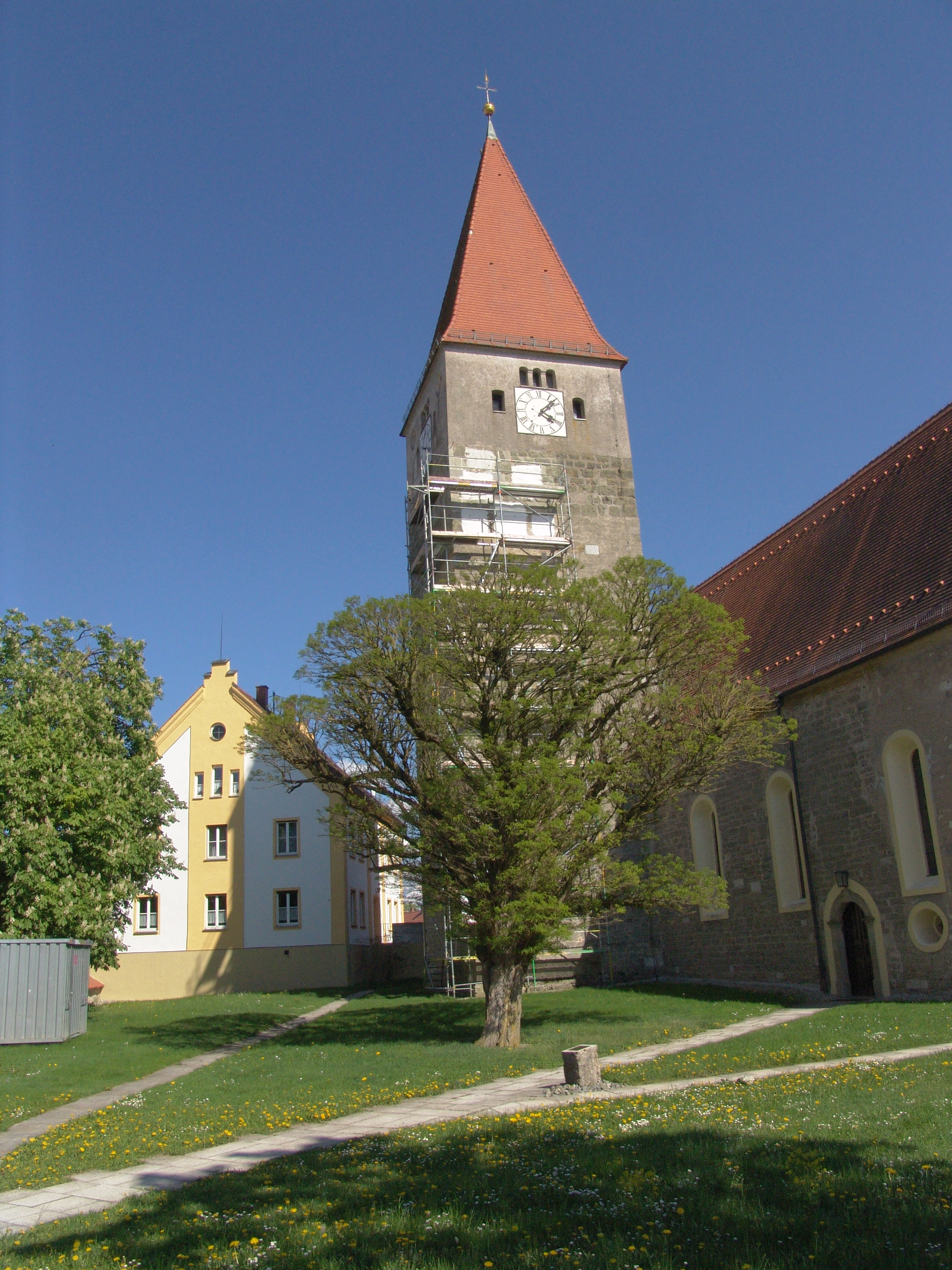 St. Martin in Deiningen, 1616 bis 1961 Simultankirche, seit 1961 wieder kath.